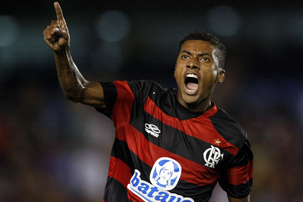 José Kléberson Pereira (Uraí, 19 de junho de 1979) é um futebolista brasileiro que atua como volante ou meia.